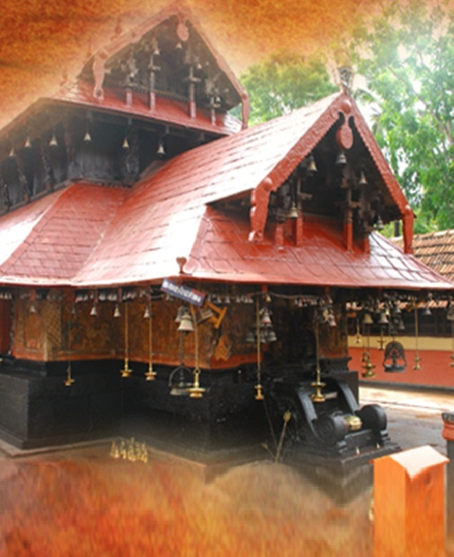 മന്നാർ വലിയ പനയന്നാർകാവ് ക്ഷേത്രം